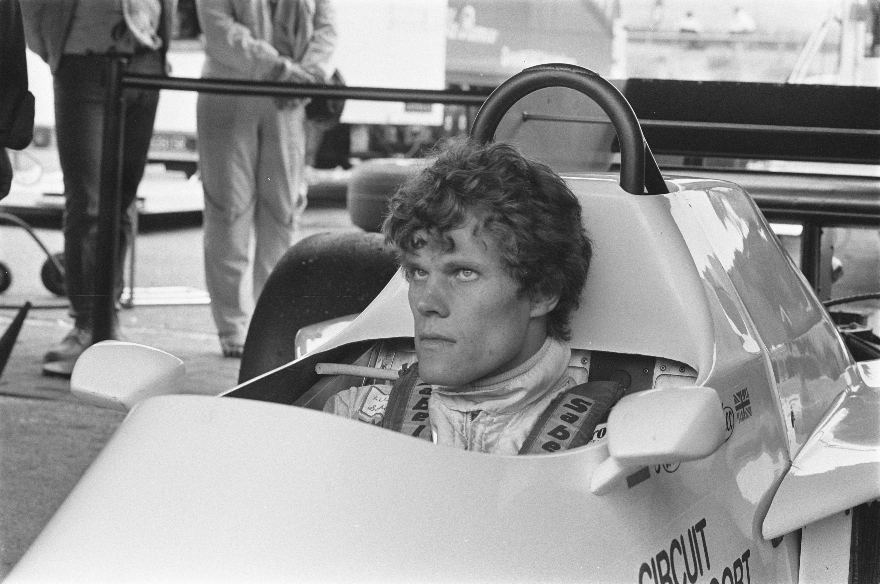 Collectie / Archief : Fotocollectie Anefo Reportage / Serie : Grand Prix Zandvoort 1984 Beschrijving : Bandentesten voor Grand Prix Zandvoort; Huub Rothengatter in wagen Datum : 28 juli 1984 Locatie : Noord-Holland, Zandvoort Trefwoorden : autocoureurs, autosport, raceauto's Persoonsnaam : Rothengatter, Huub Fotograaf : Croes, Rob C. / Anefo Auteursrechthebbende : Nationaal Archief Materiaalsoort : Negatief (zwart/wit) Nummer archiefinventaris : bekijk toegang 2.24.01.05 Bestanddeelnummer : 933-0413